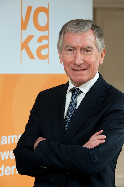 Luc De Bruyckere was van 2009 tot 2012 voorzitter van Voka (Vlaams Netwerk van Ondernemingen)